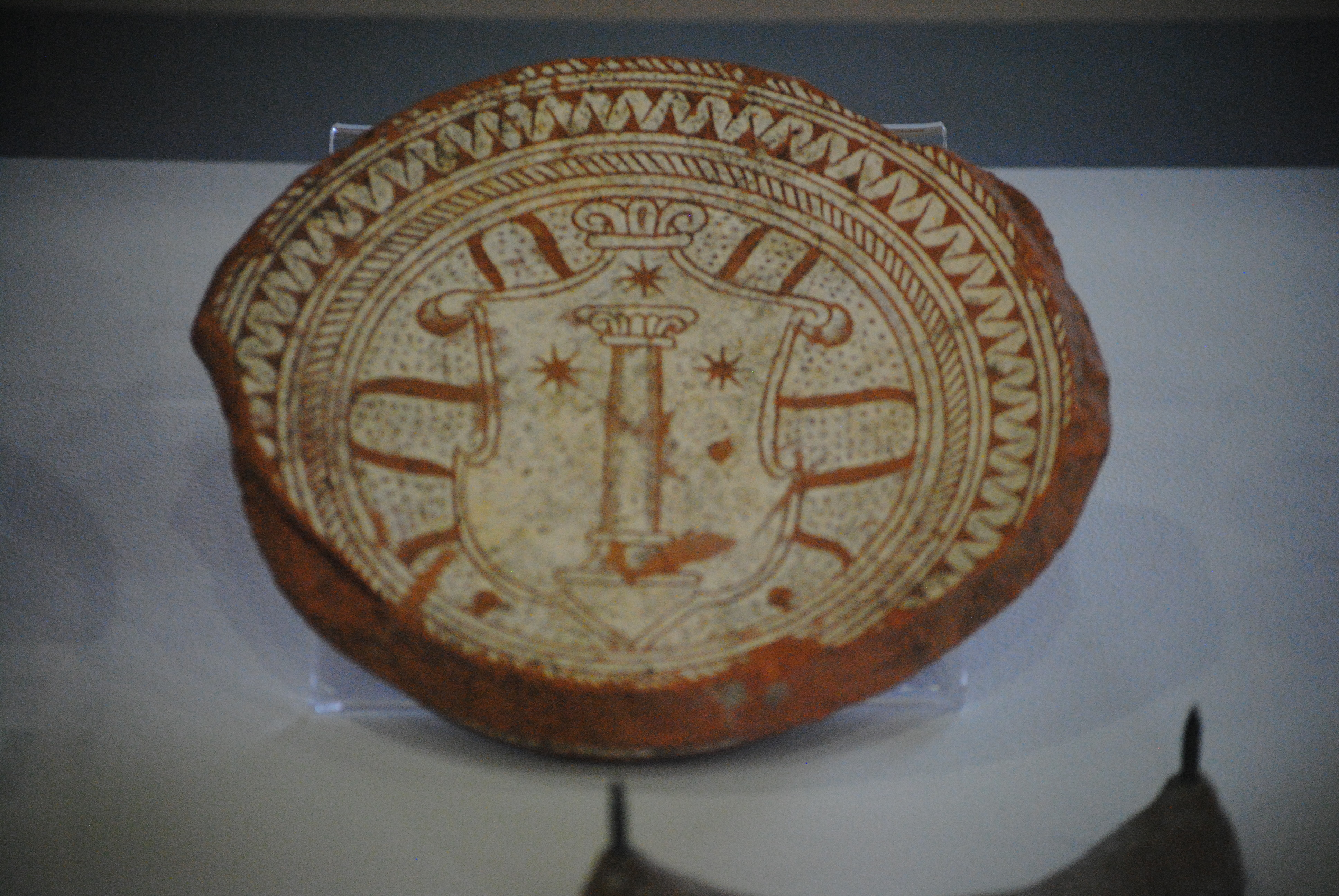 Fondo di un recipiente ingobbiato e graffito a stecca - Motivo araldico - Museo Nazionale di San Matteo.